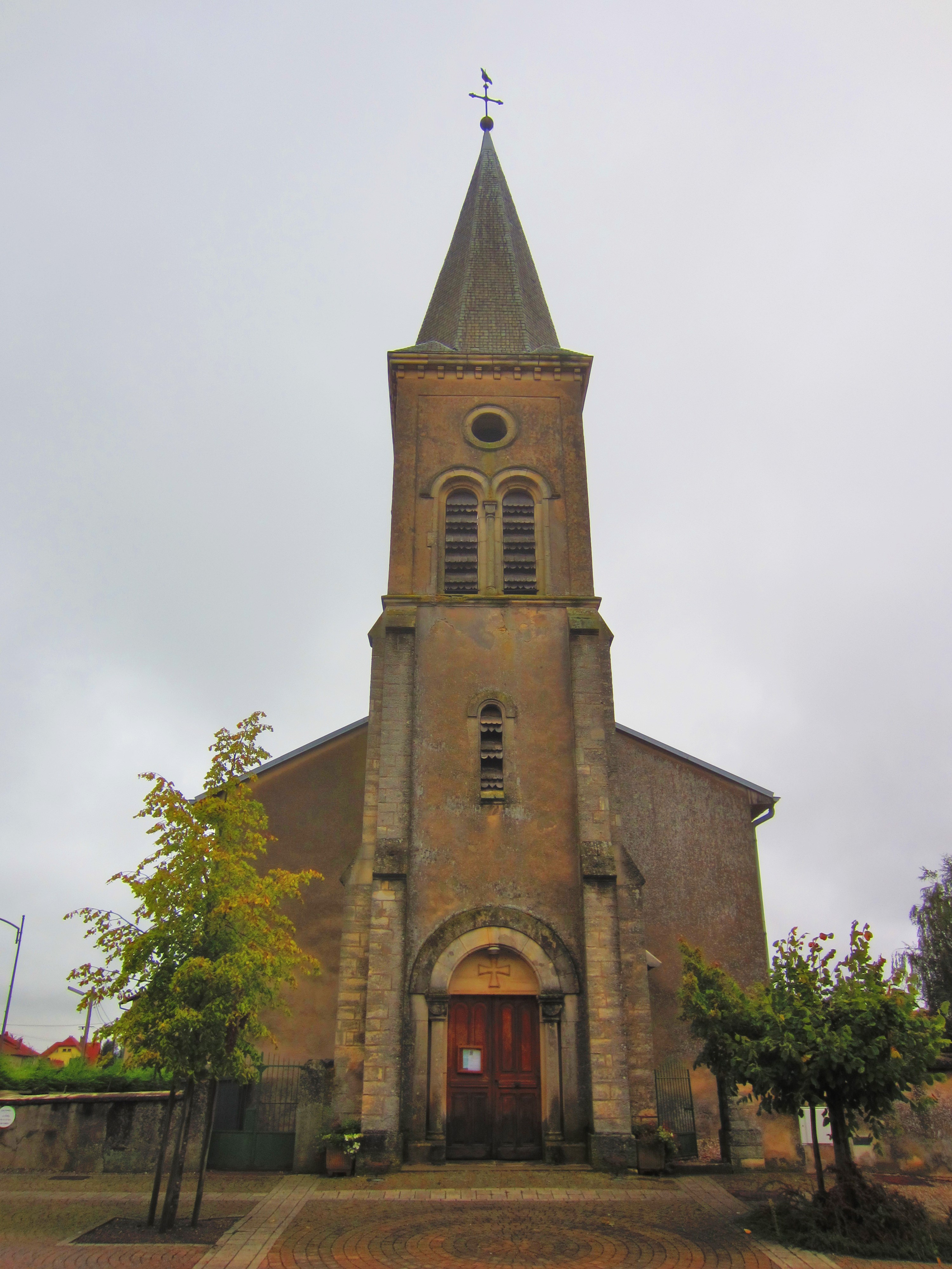 Eglise Coutures